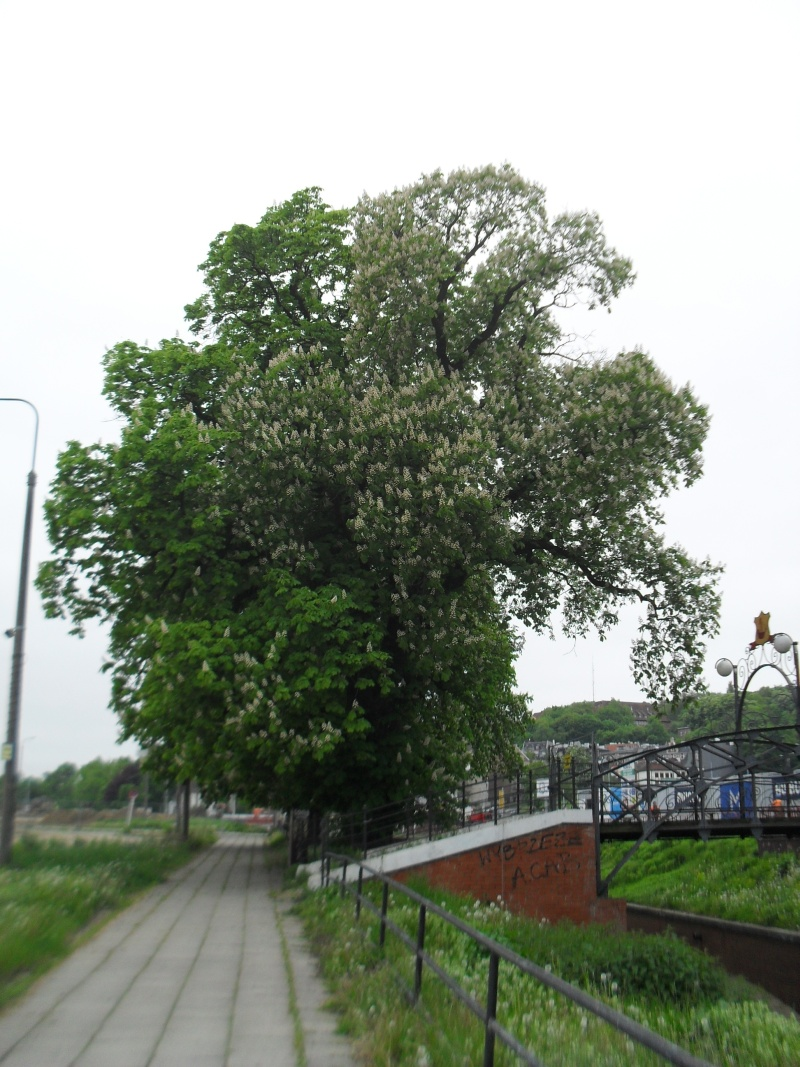 750. Kasztanowiec zwyczajny - pomnik przyrody - na Targu Siennym przy kanale Raduni, przy szafce elektrycznej.